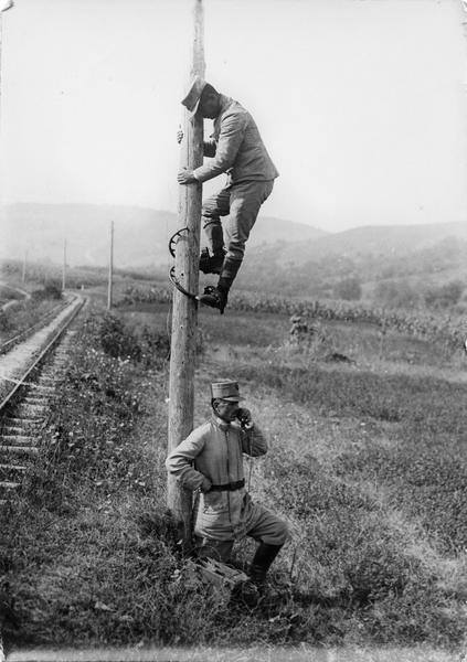 Verificarea liniei telefonice pe Valea Caşinului, august 1917. În planul II: Calea ferată forestieră Oneşti-Scutaru